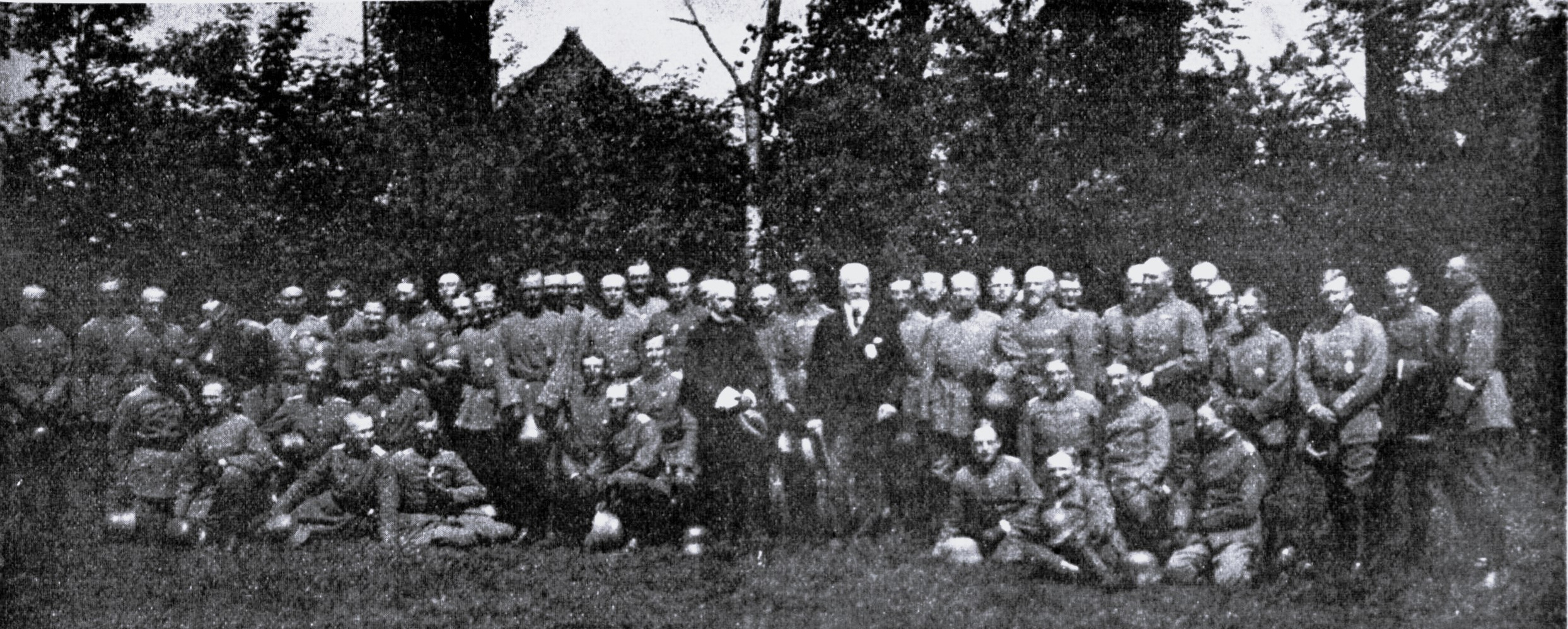 Bürgermeister Dr. Fehling und Regierungsrat Dr. Plessing inmitten des Offizierskorps des Regiments Lübeck.